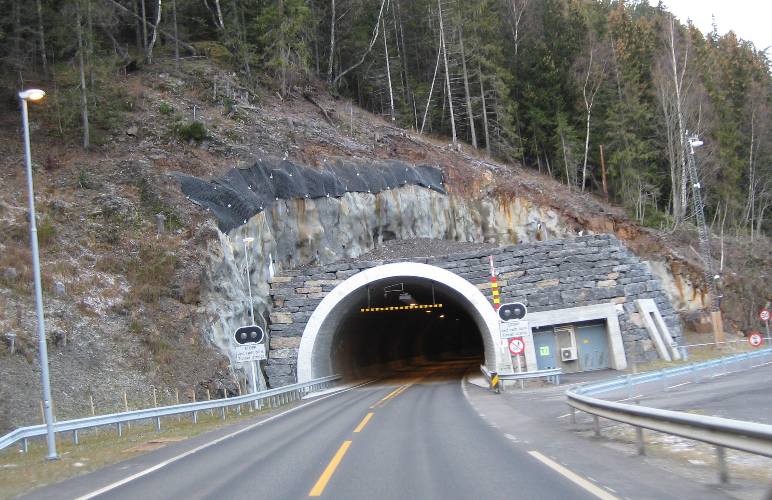 Falkentunnelen Østre Toten